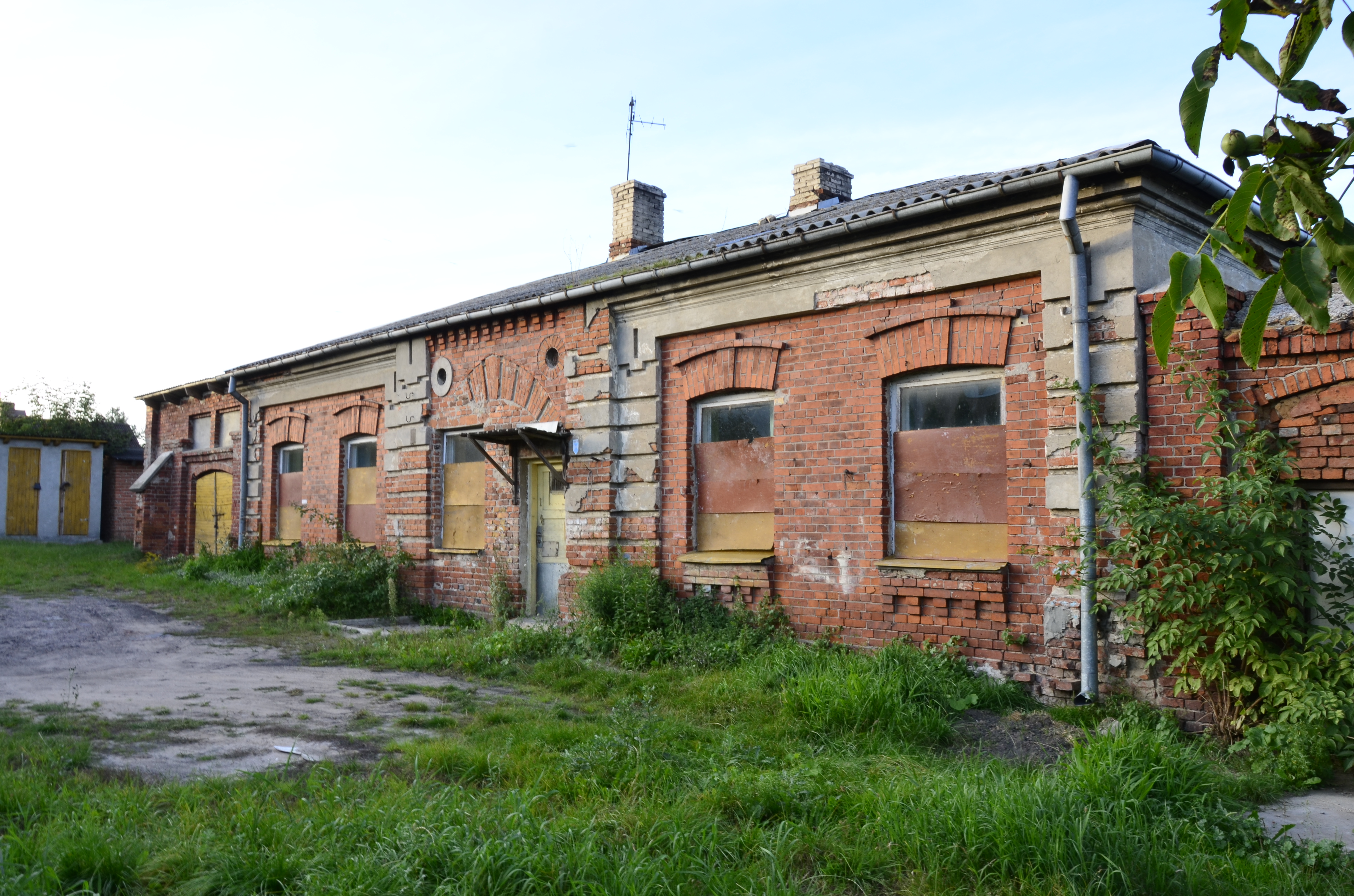 Dom przedpogrzebowy Łomża ul. Wąska 69, Łomża